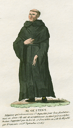 Collection de costumes de tous les ordres monastiques, supprimés à differentes époques, dans la ci-devant Belgique, Bruxelles, Philippe Joseph Maillart et sœur, 1811